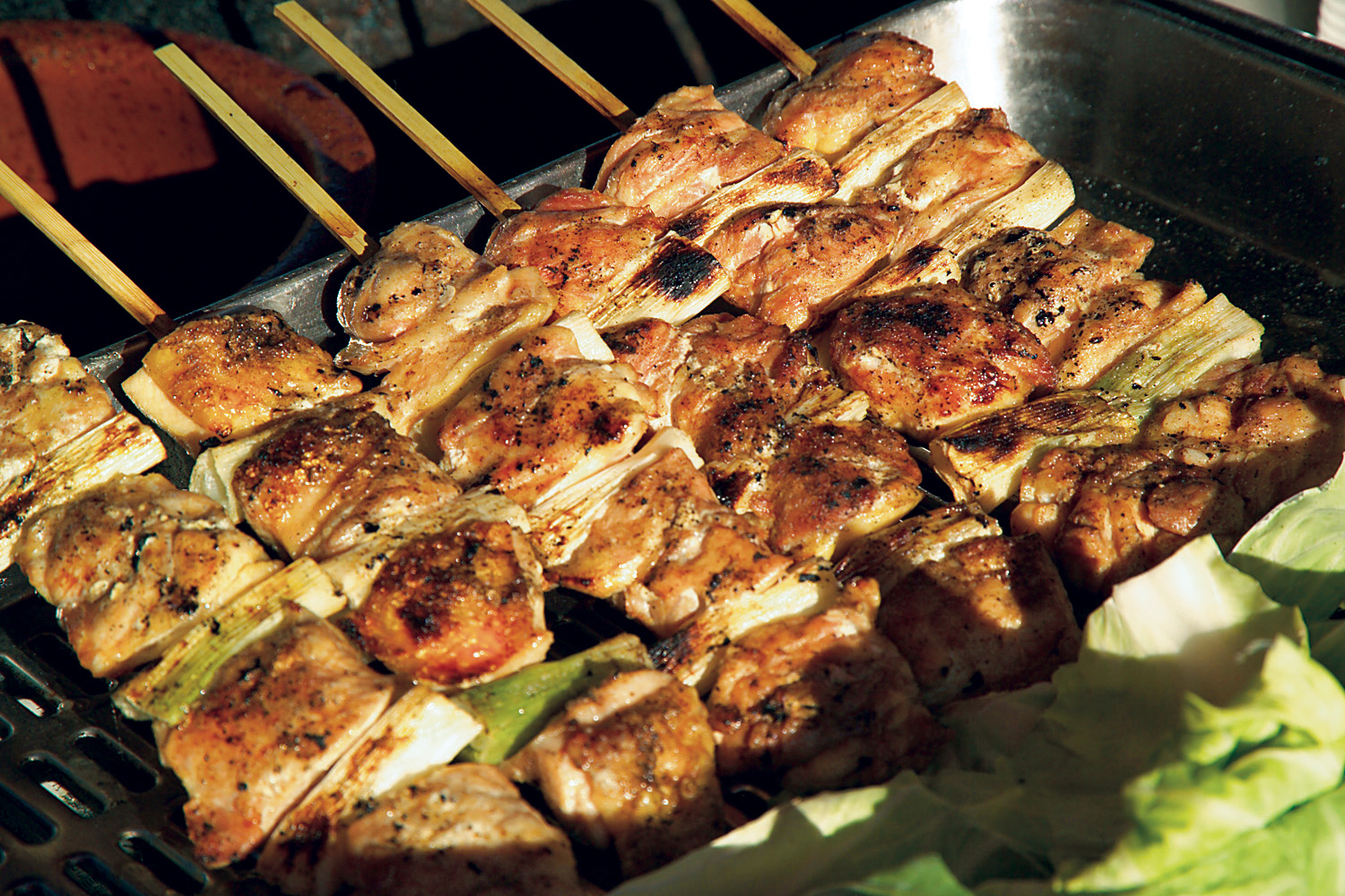 Street vendor in Osaka prepares yakitori.